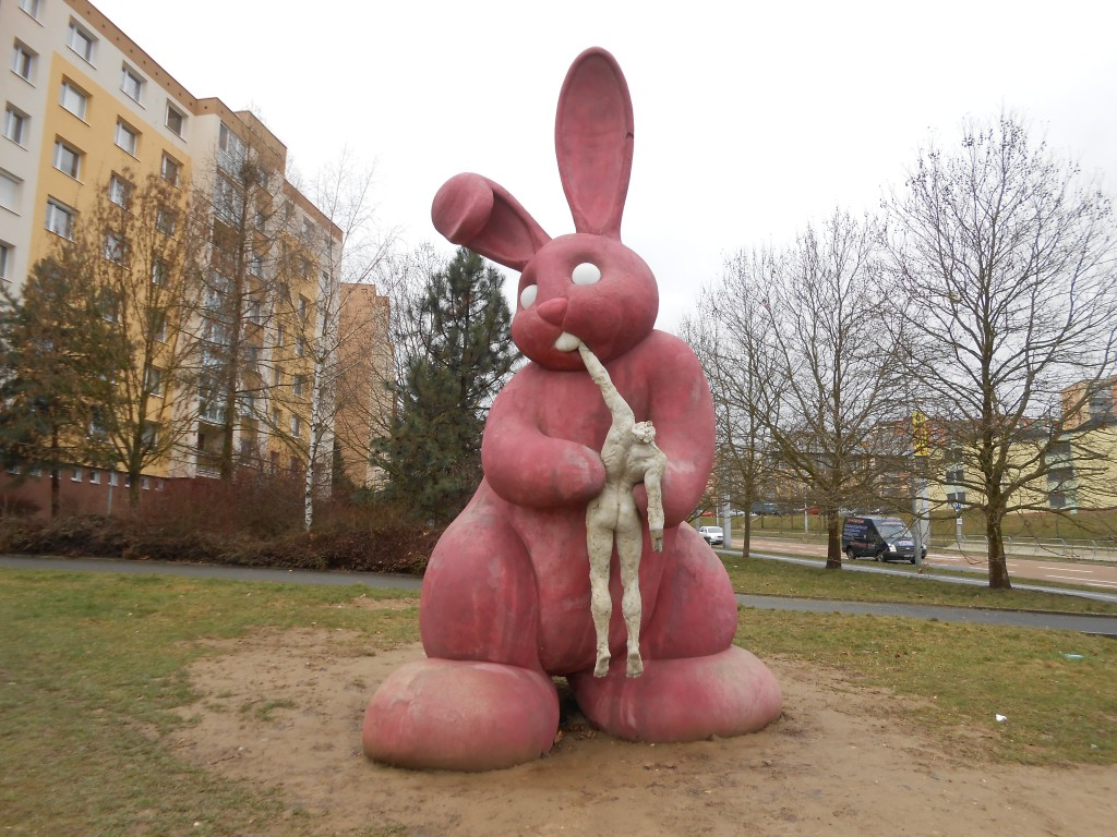 Plzeň-Košutka, betonová socha Panoptikum na křižovatce ulic Studentská/Gerská; autor Adam Trbušek (2015)